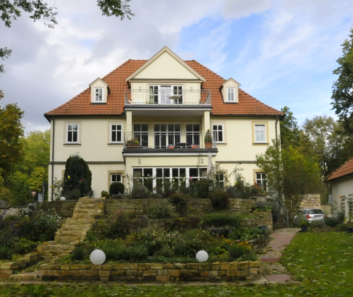 Gotha, Parkallee 13